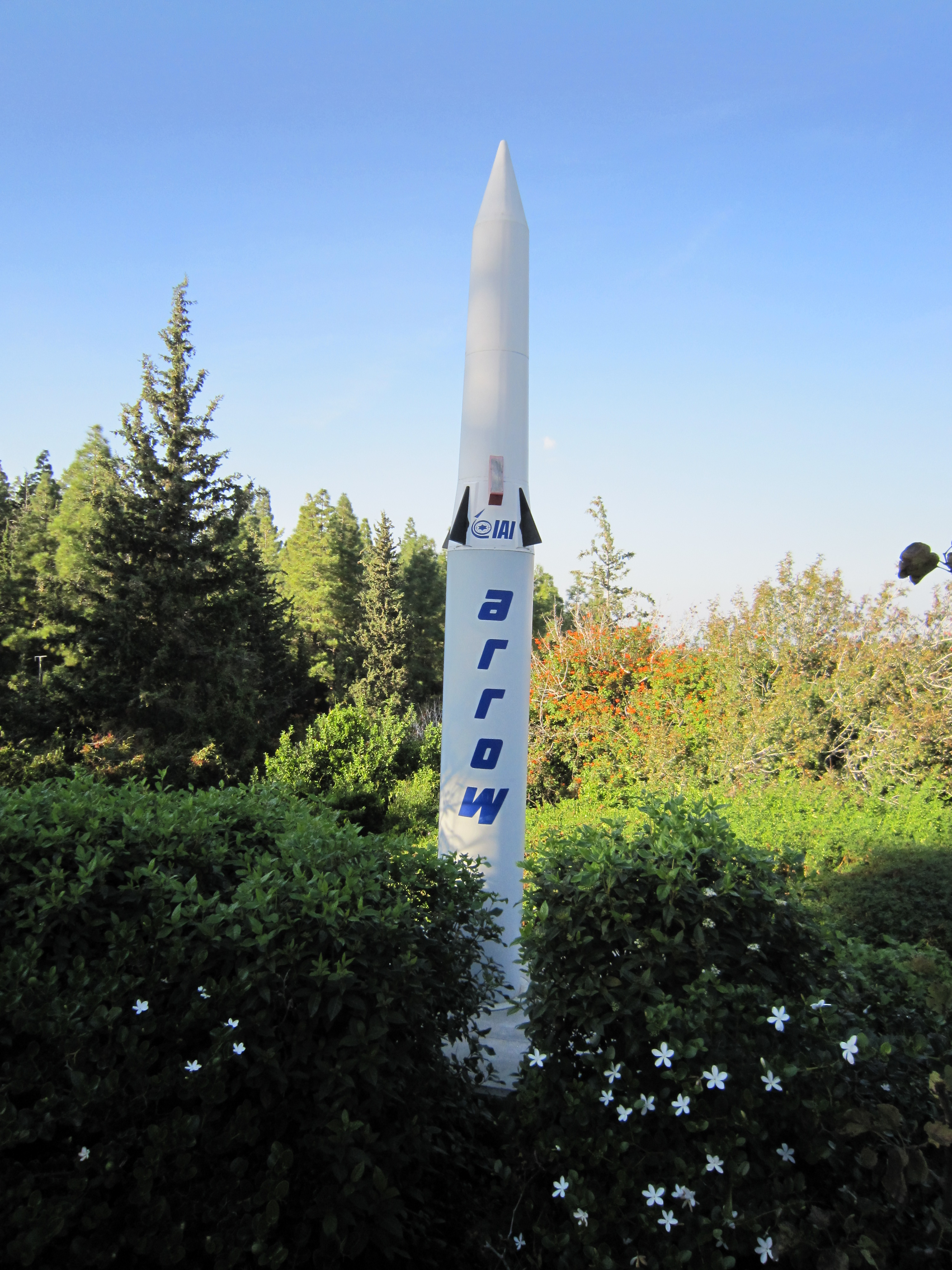 דגם של טיל החץ ליד הפקולטה להנדסת אווירונאוטיקה וחלל בטכניון